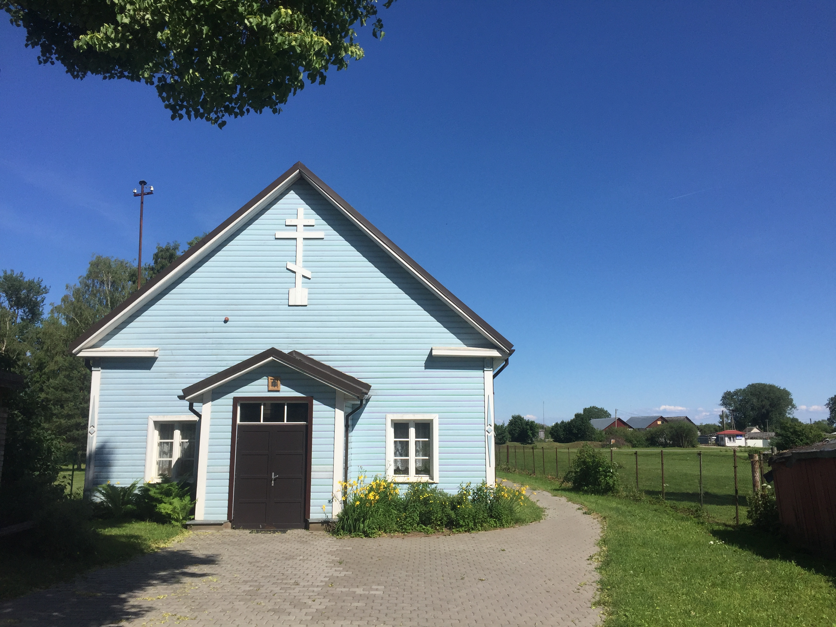 Raatvere maa-alune kalmistu